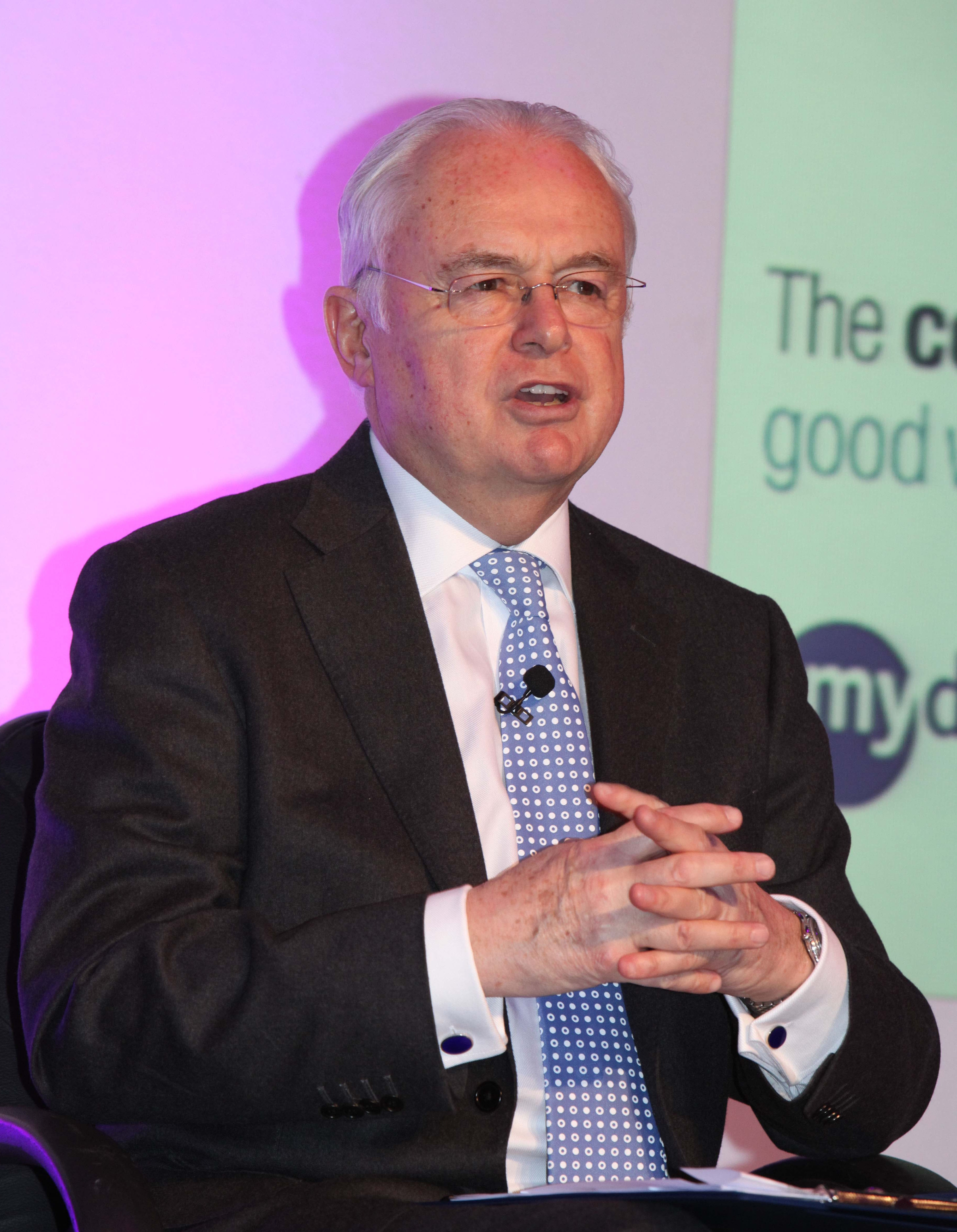 Martyn Lewis, Chair NCVO